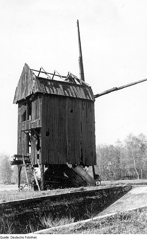 Original image description from the Deutsche Fotothek Zemnick. Bockmühle